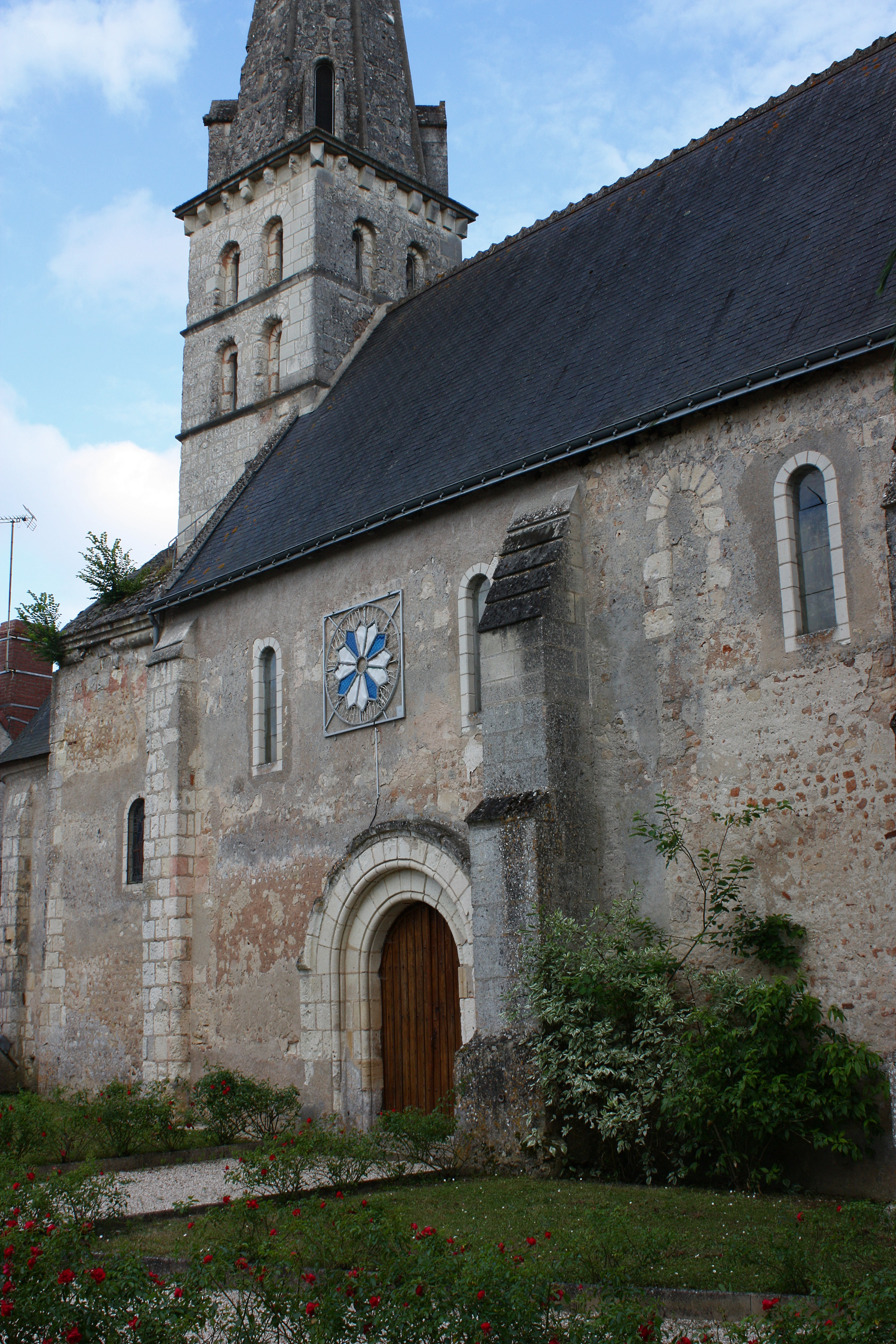 Sennevières - Eglise Saint-Leubais